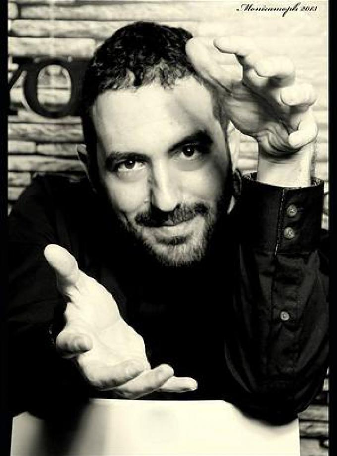 Foto del autore